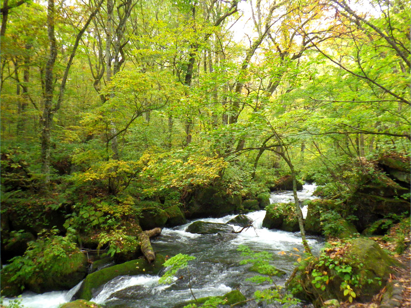 奥入瀬渓流の中ほどにある、阿修羅の流れです